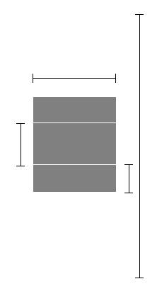 Esquema de una cancha de Hacky Attack